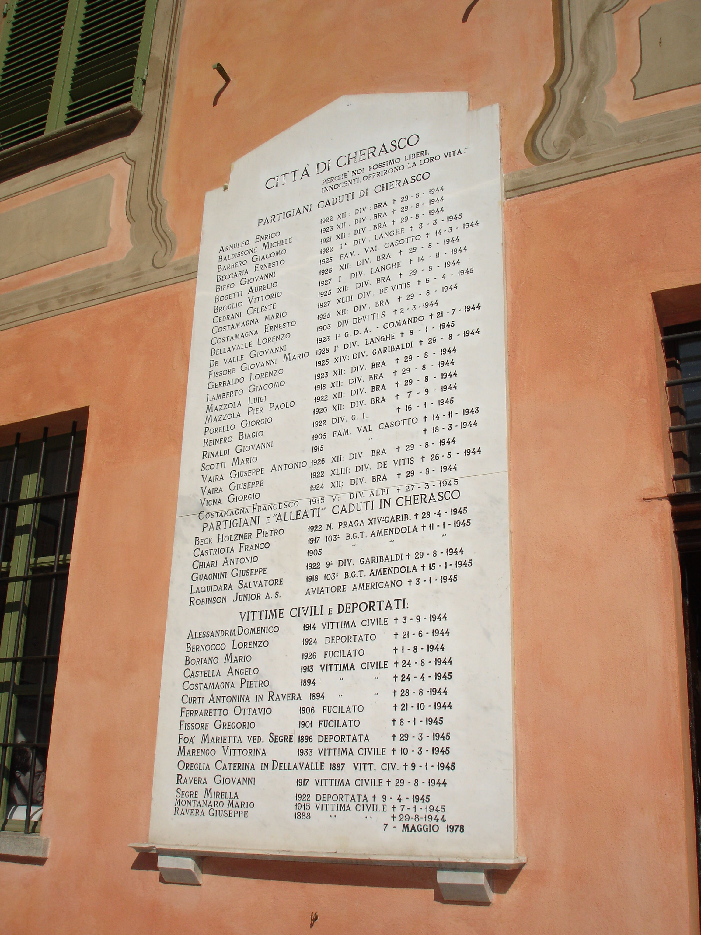 Lapide dei caduti partigiani ed alleati a Cherasco